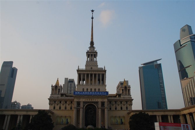 上海展览馆